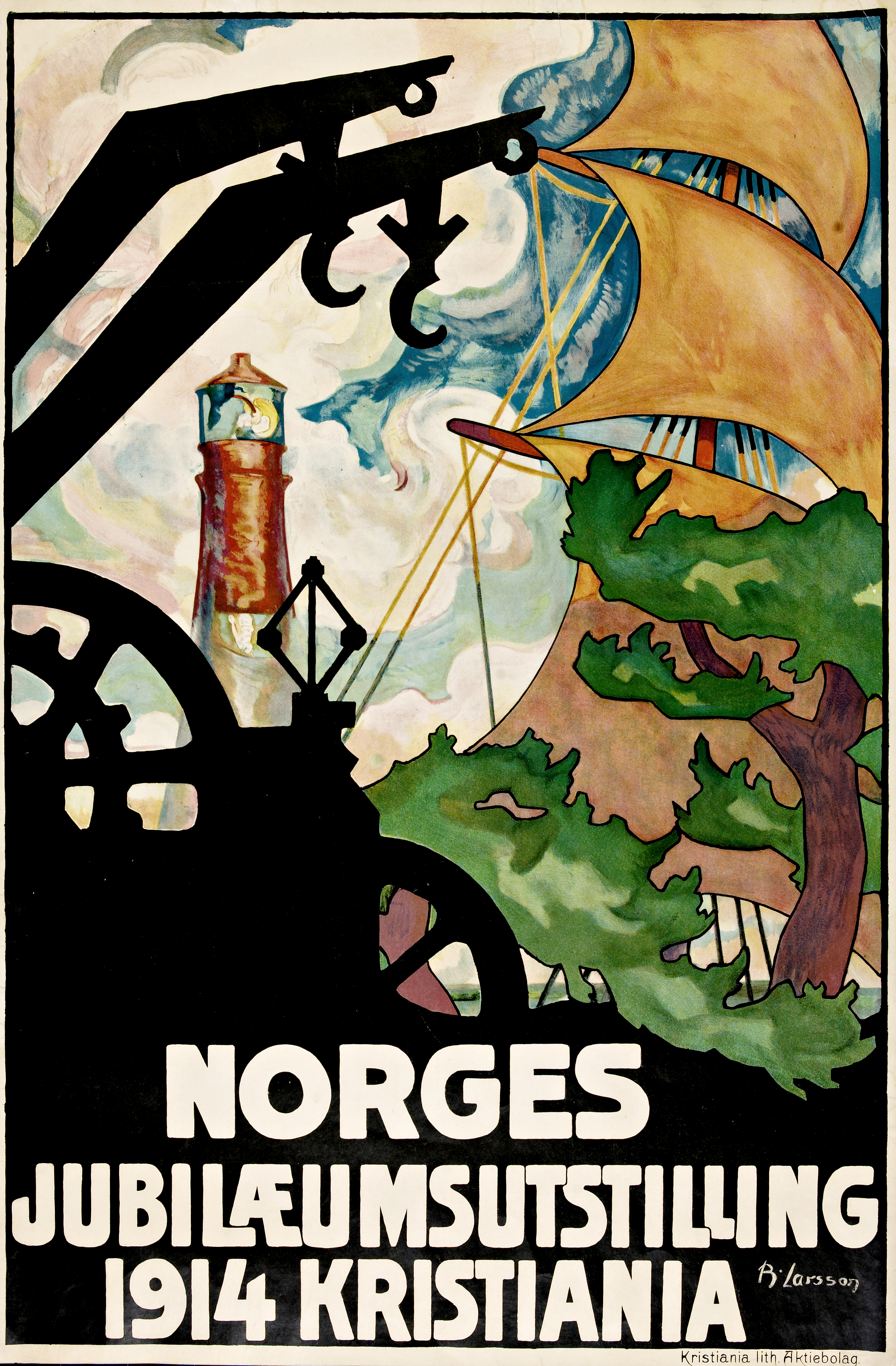 Den offisielle utstillingsplakaten til Jubileumsutstillingen på Frogner 1914. Tittel / Title: Norges Jubilæumsutstilling 1914 Kristiania. Beskrivelse / Description: Plakat / Poster. Dato / Date: 1914. Kreditering / Credit: Brynjulf Larsson (1881-1920). Trykkeri / Printing House: Kristiania lithografiske Aksjebolag. Trykkemetode / Printing method: Litografi, 100,4 x 66,4. Eier / Owner Institution: Nasjonalbiblioteket / National Library of Norway. Bildesignatur / Image Number: plktr_01839